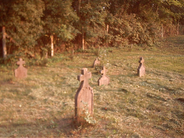 Bakonygyiróti temető / Cemetery of Bakonygyirót